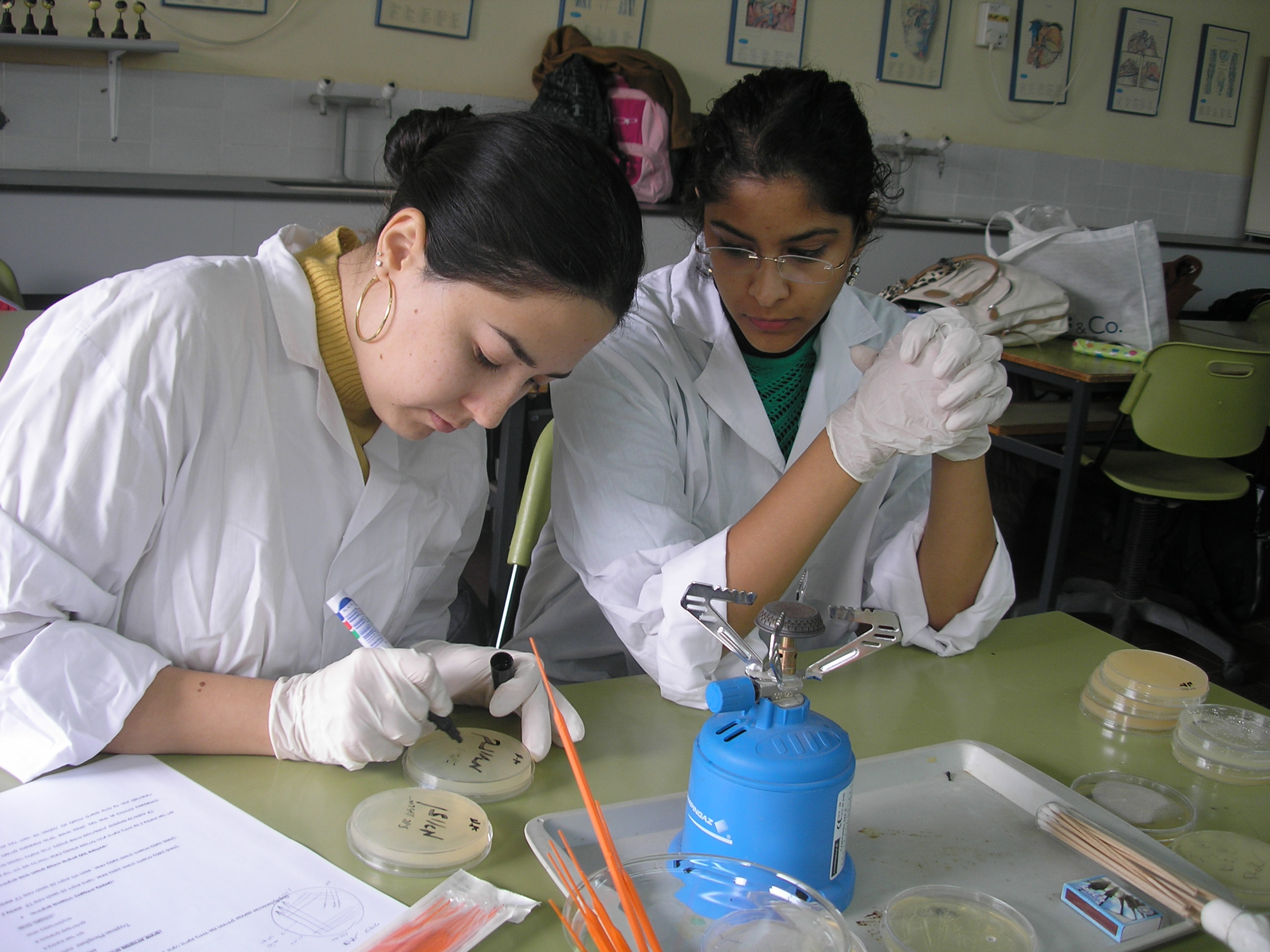 סטודנטיות במעבדה - מכללת לוינסקי לחינוך